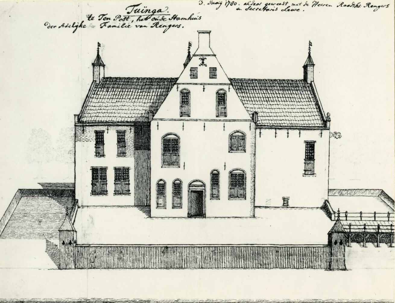 De borg Tuwinga tussen Ten Post en Wittewierum. De tekst vermeldt: "Tuïnga te Ten Post, het oude stamhuis der adelijke Familie van Rengers. 3 Junij 1780. aldaar geweest met de Heeren Raadsh. Rengers en Secretaris Lewe." Voorstudie voor de Beckeringhkaart van 1781. Niet opgenomen op uiteindelijke kaart.